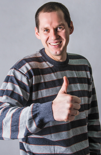 Александр Федоров. Заслуженный мастер спорта. Бронзовый призер Олимпийских игр (Афины, 2004), обладатель Кубка мира, победитель Мировой лиги, многократный чемпион и обладатель Кубка России по водному поло. Фотография из серии «Лица эстафеты».